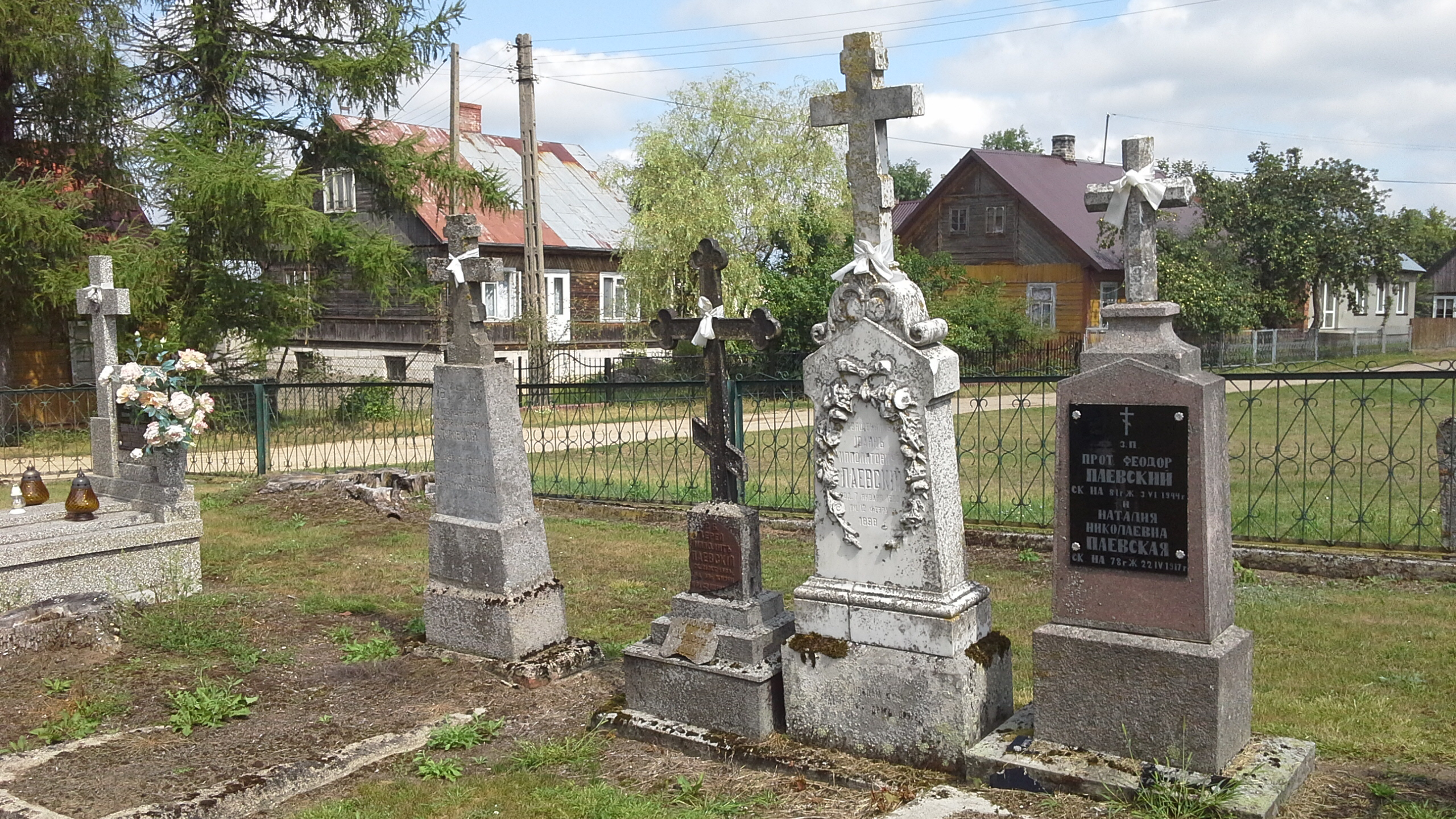 Krzyże nagrobne przy cerkwi św. Barbary w Milejczycach